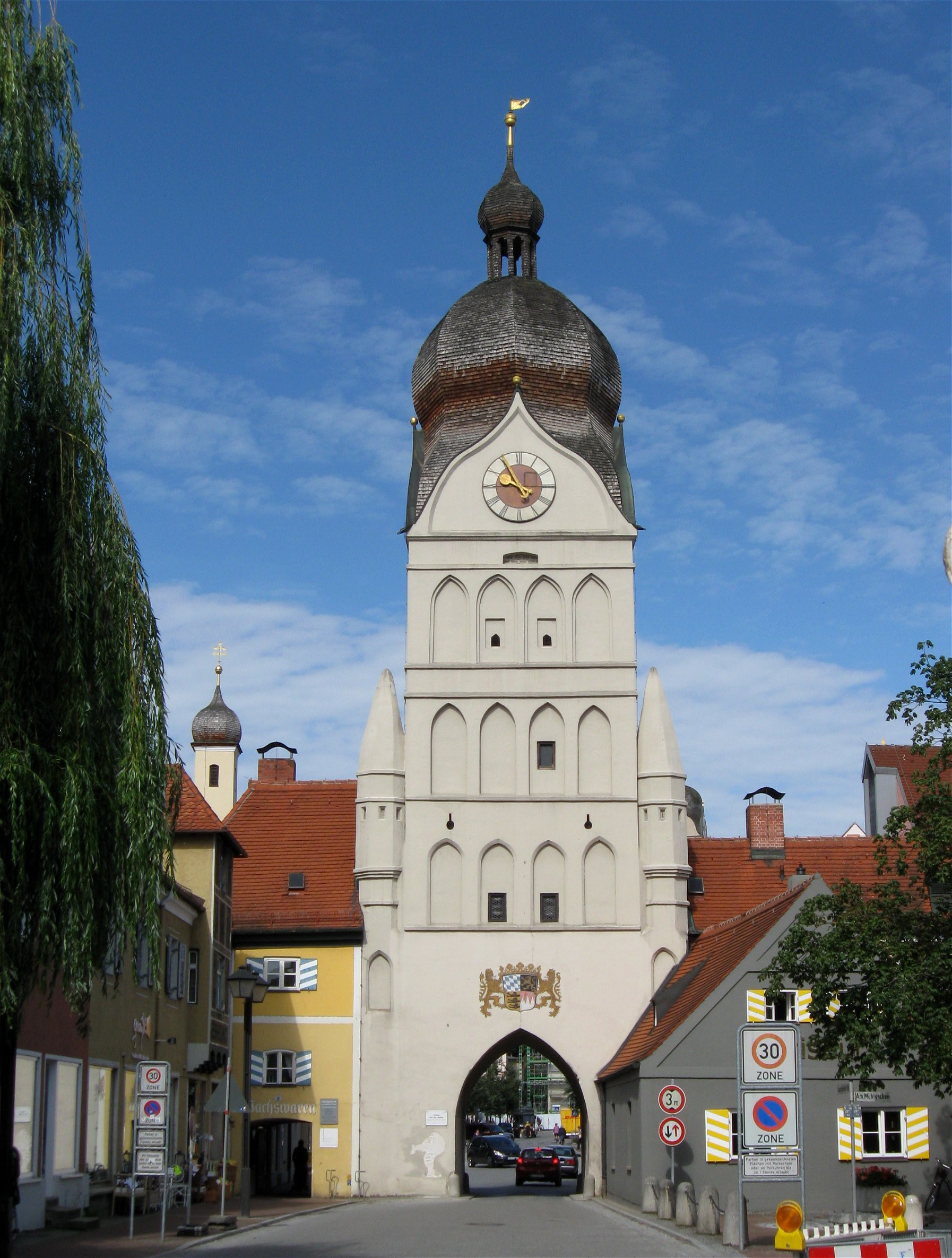 Landshuter Straße 11. Landshuter Tor (Schöner Turm), Backsteinbau, 15. Jh., Haubenkuppel 1660/64, mit Torhaus 17. Jh.